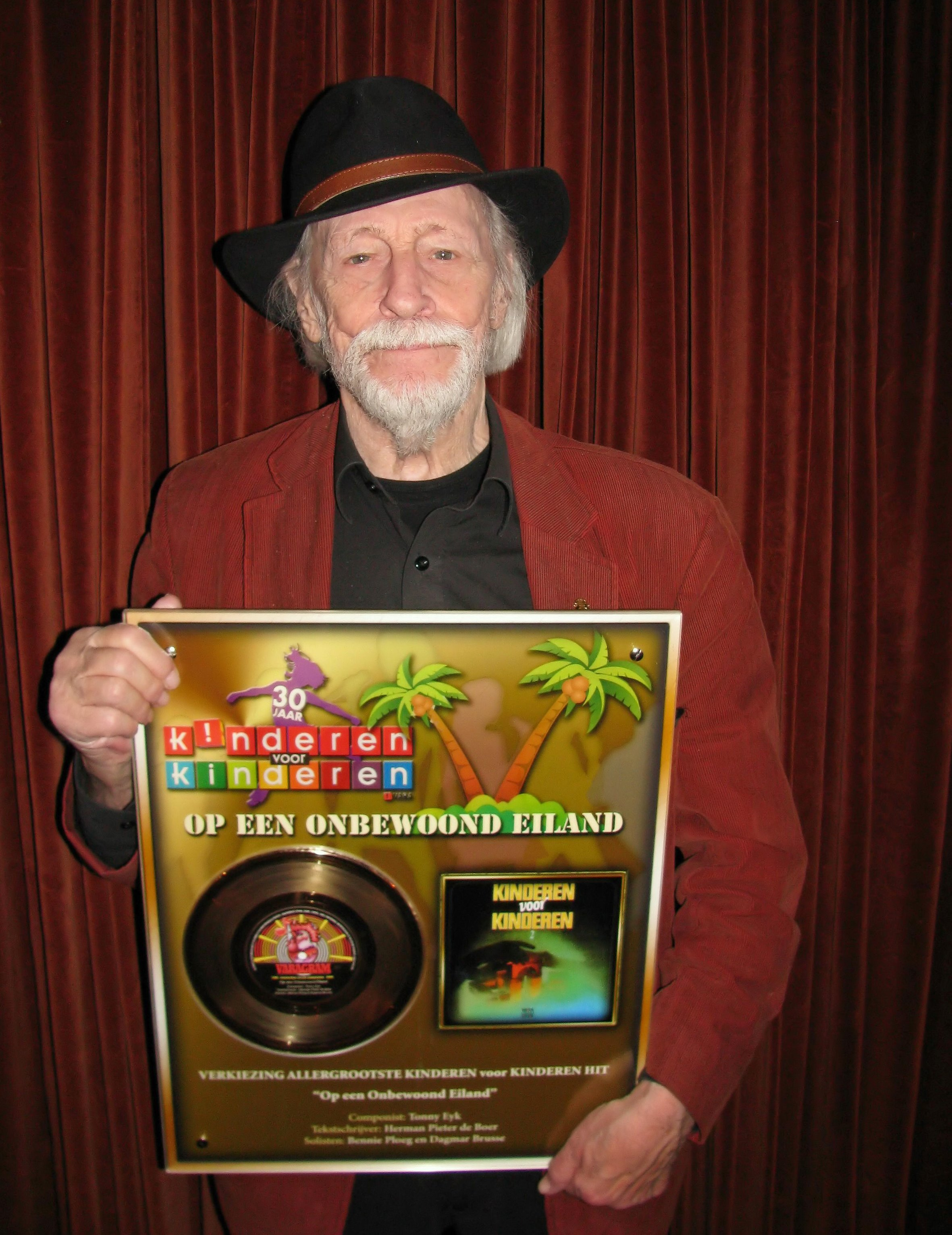 Herman Pieter de Boer (Rotterdam, 9 februari 1928 - Eindhoven, 1 januari 2014) was een Nederlands schrijver en journalist.